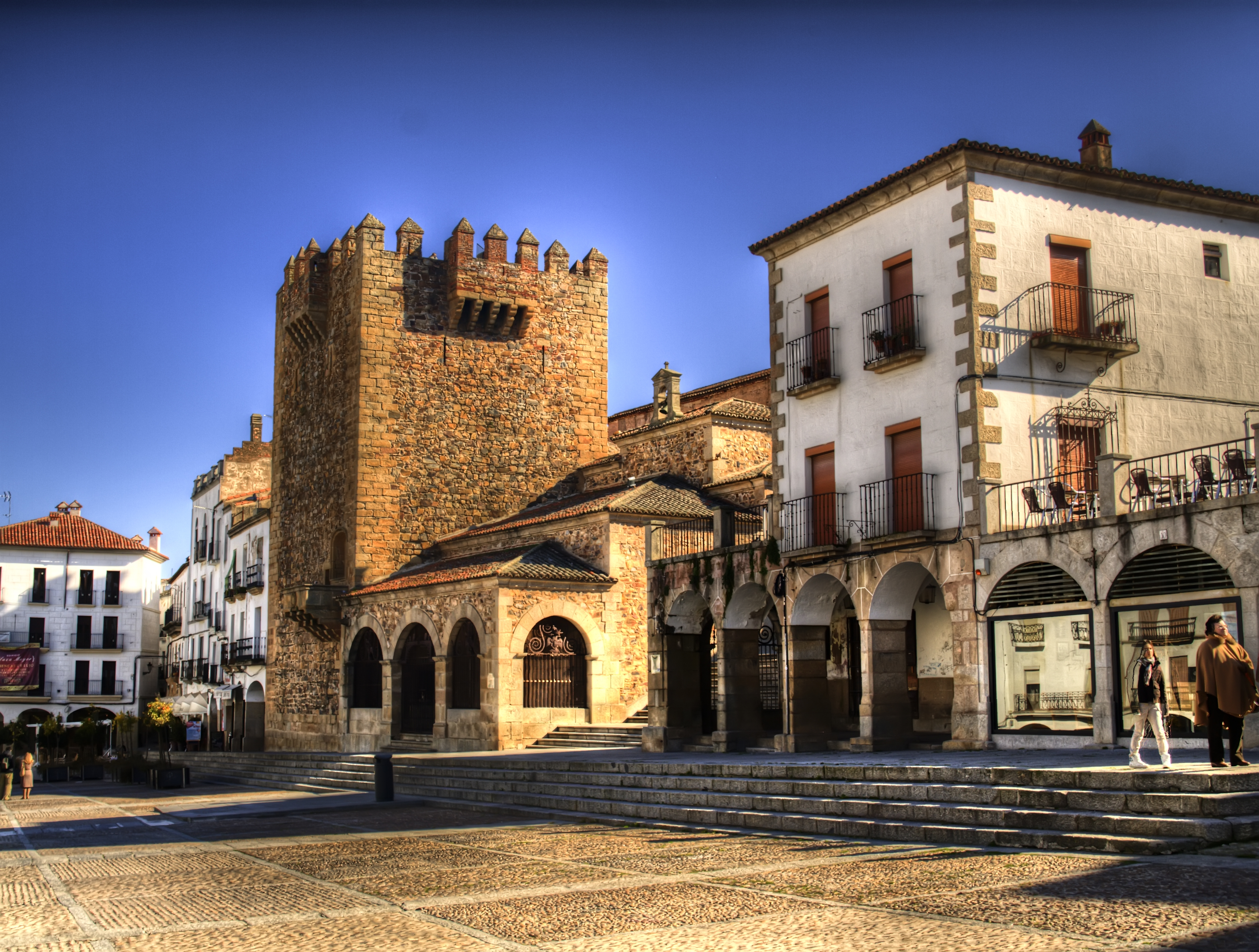 Caceres_1_1